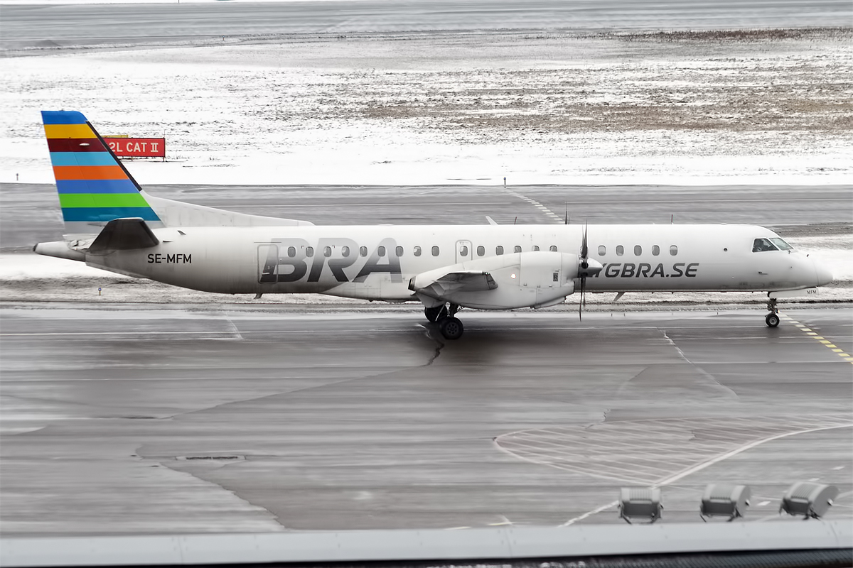 BRA, SE-MFM, Saab 2000